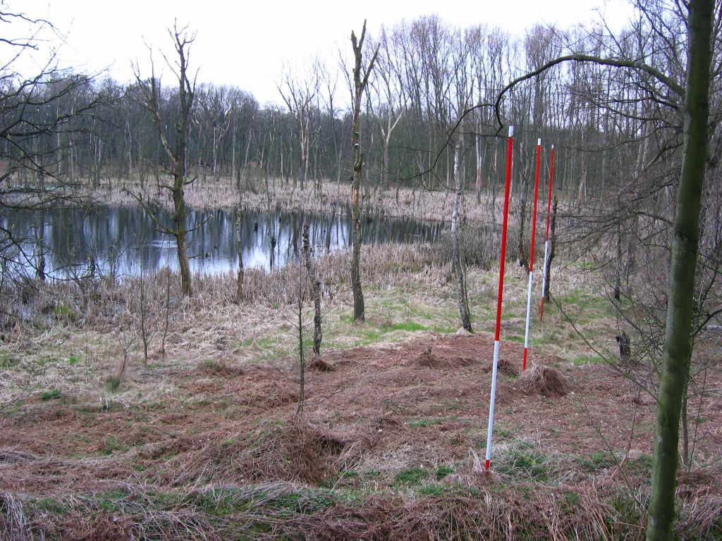 Emscherbruch Nähe Zeche Ewald 1/2/7, Bergsenkungen zwischen 1980 und 2006